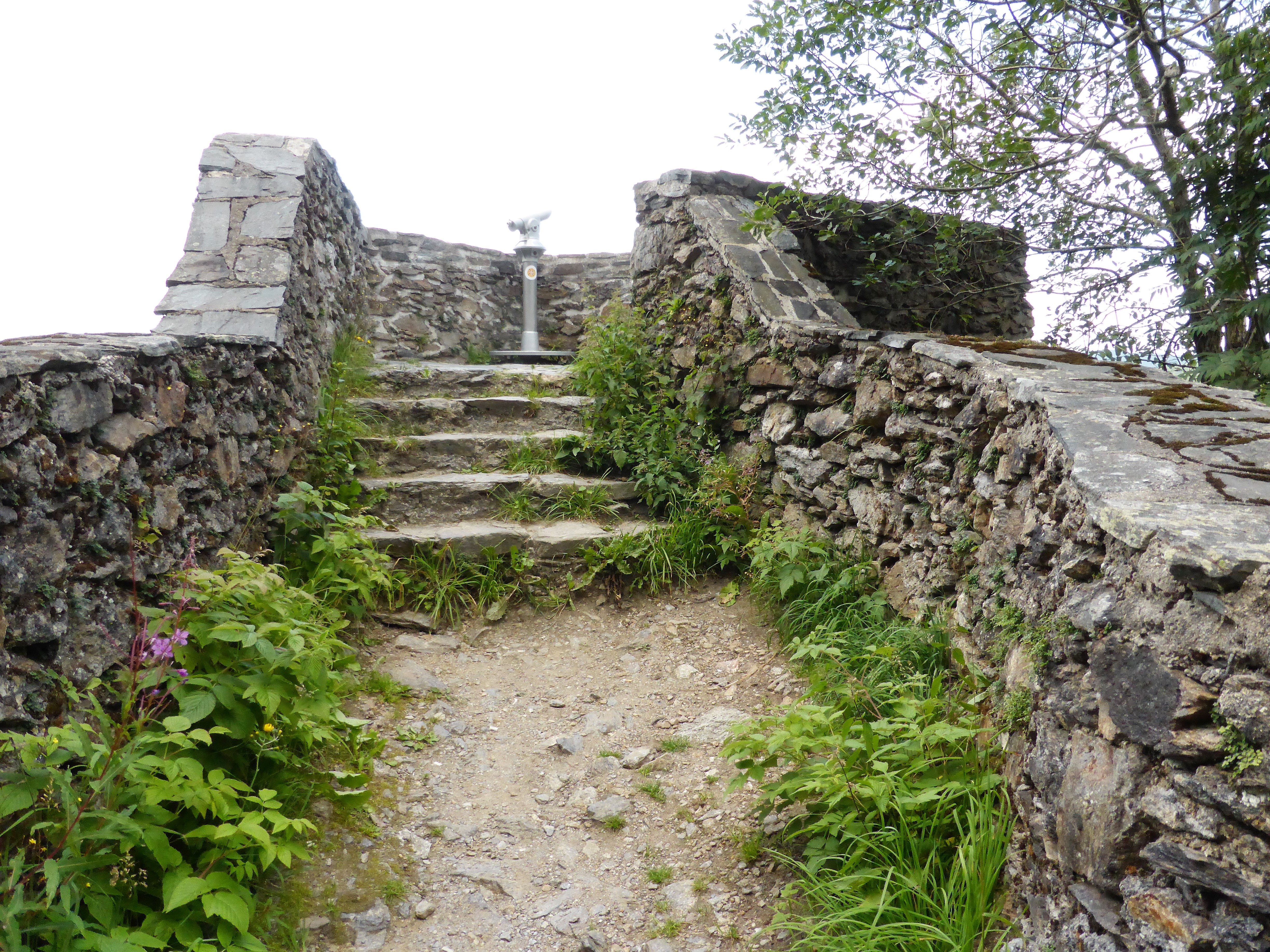 Die Hindenburg-Kanzel ist ein vorspringender Felsriegel an der Brennesstraße bei Lohberg im Landkreis Cham. Der 1062 m hohe Aussichtsplatz bietet eine gute Fernsicht über die Waldhügellandschaft, samt kleiner und großer Osser.